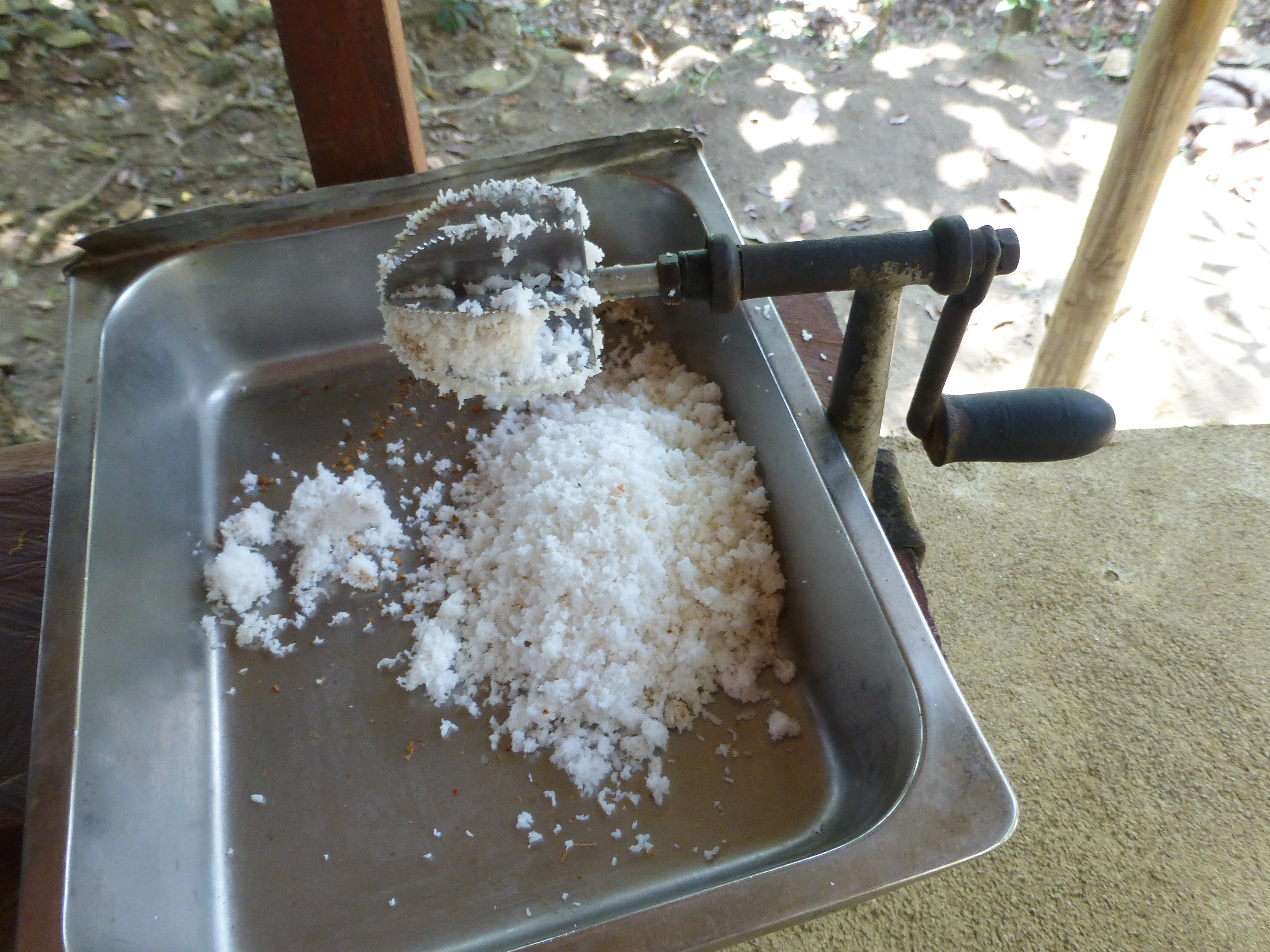 Râpe à noix de coco (Sri Lanka)